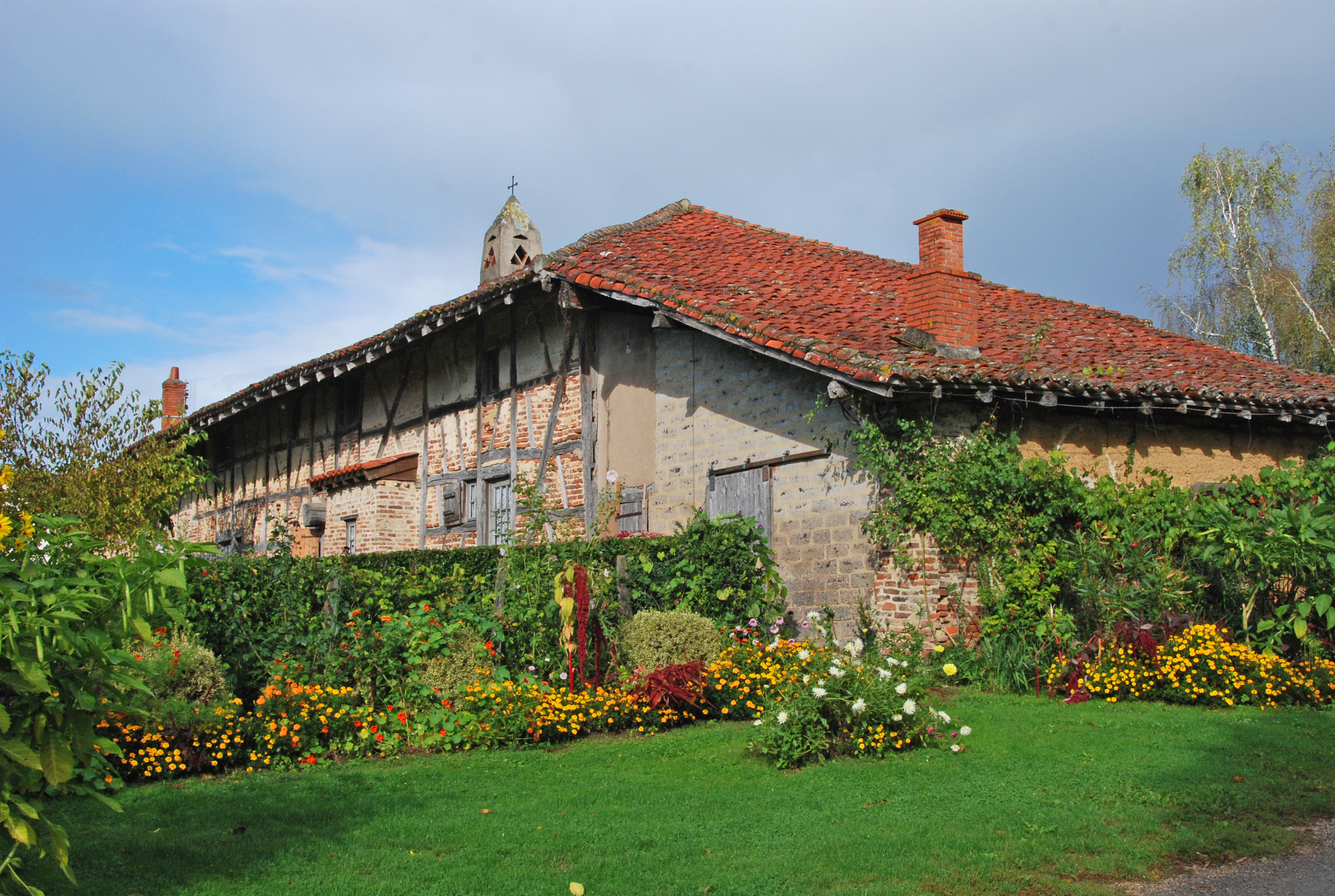 Ferme de Montalibord, Montalibord (Classé, 1974) .